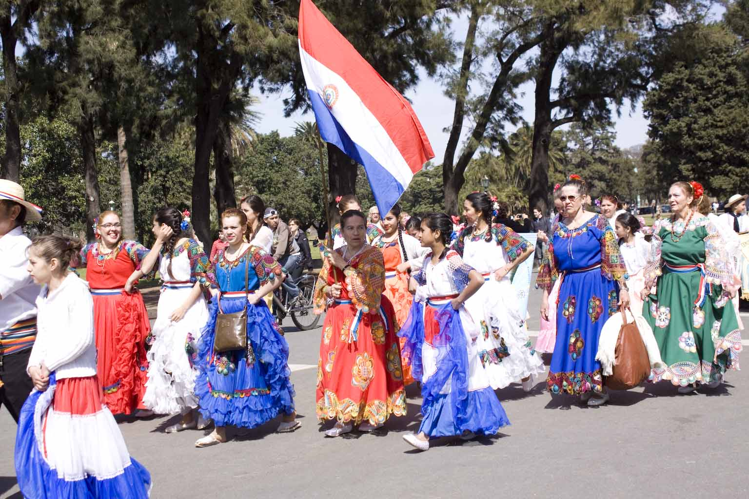 Dia del inmigrante 027